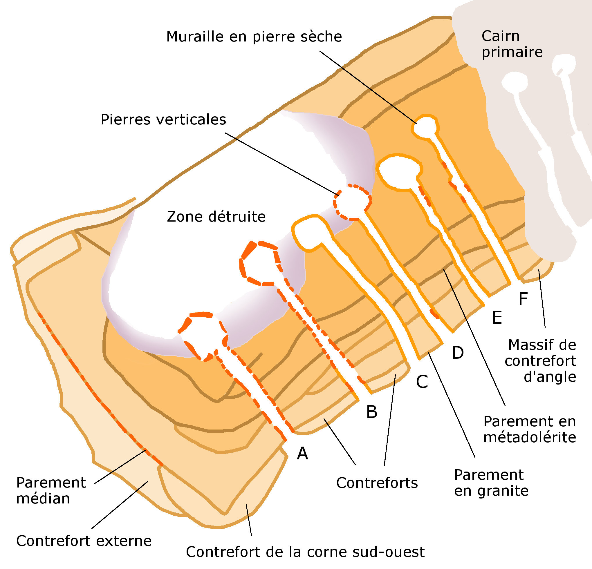 Plan du cairn secondaire de Barnenez, en Plouezoc'h, Finistère, Bretagne. Plan très approximatif : je n'ai pas trop respecté formes et proportions, ne cherchant qu'à faire comprendre l'organisation. Je me suis basé sur le fichier Commons « Barnenez plan.JPG » d'Athinaios (j'ai fait pivoter « nord en haut » en me fiant à la petite flèche « N »). J'ai corrigé ensuite d'après les plans d'ensemble et de détail figurant dans Pierre-Roland Giot, Barnenez, Carn, Guennoc, Université de Rennes I, 1987, t. II.